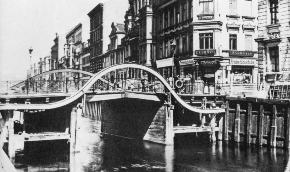 Roßstraßenbrücke über den Spreekanal in Berlin